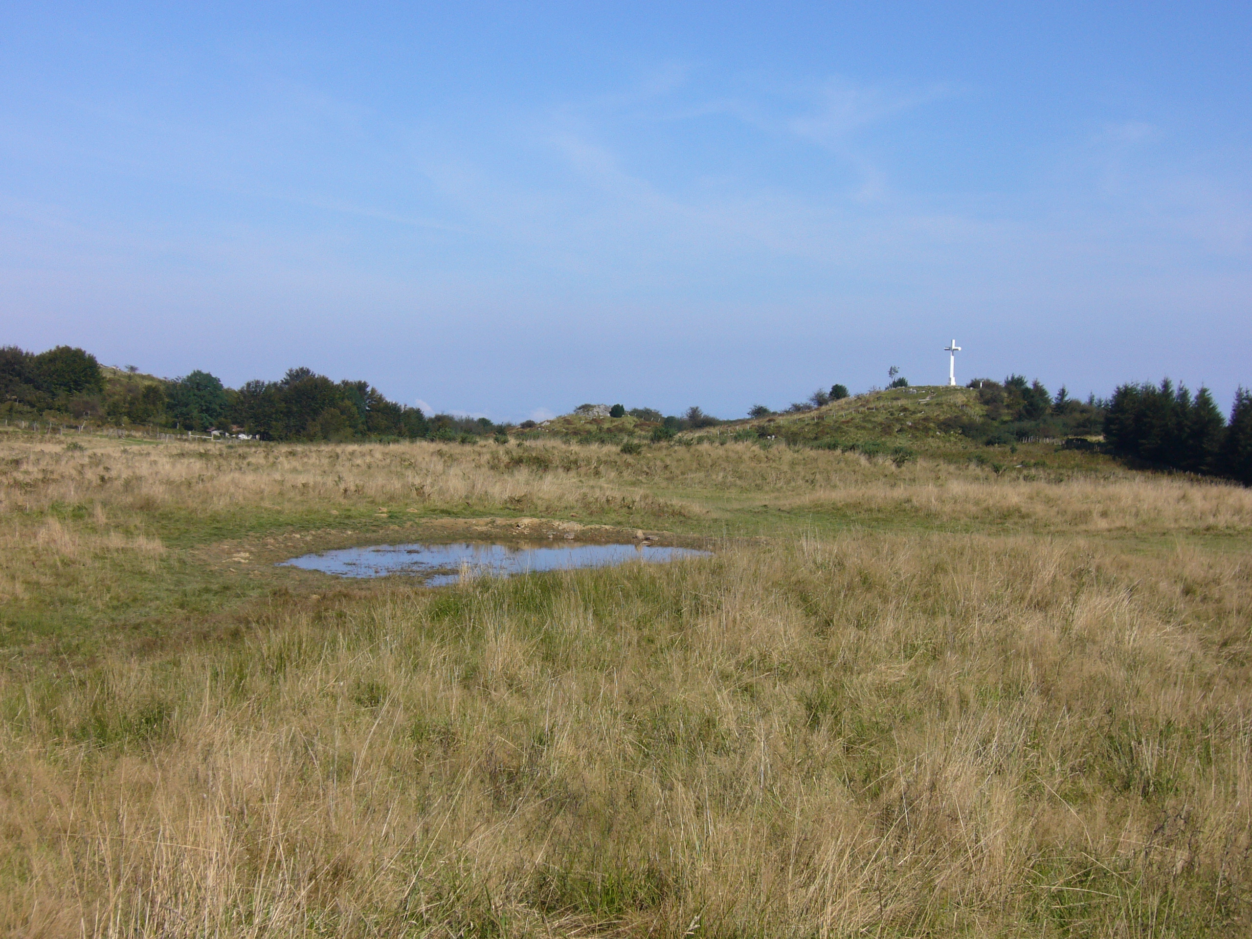 Pagoetako gaina. Agerian bertako putzuren bat